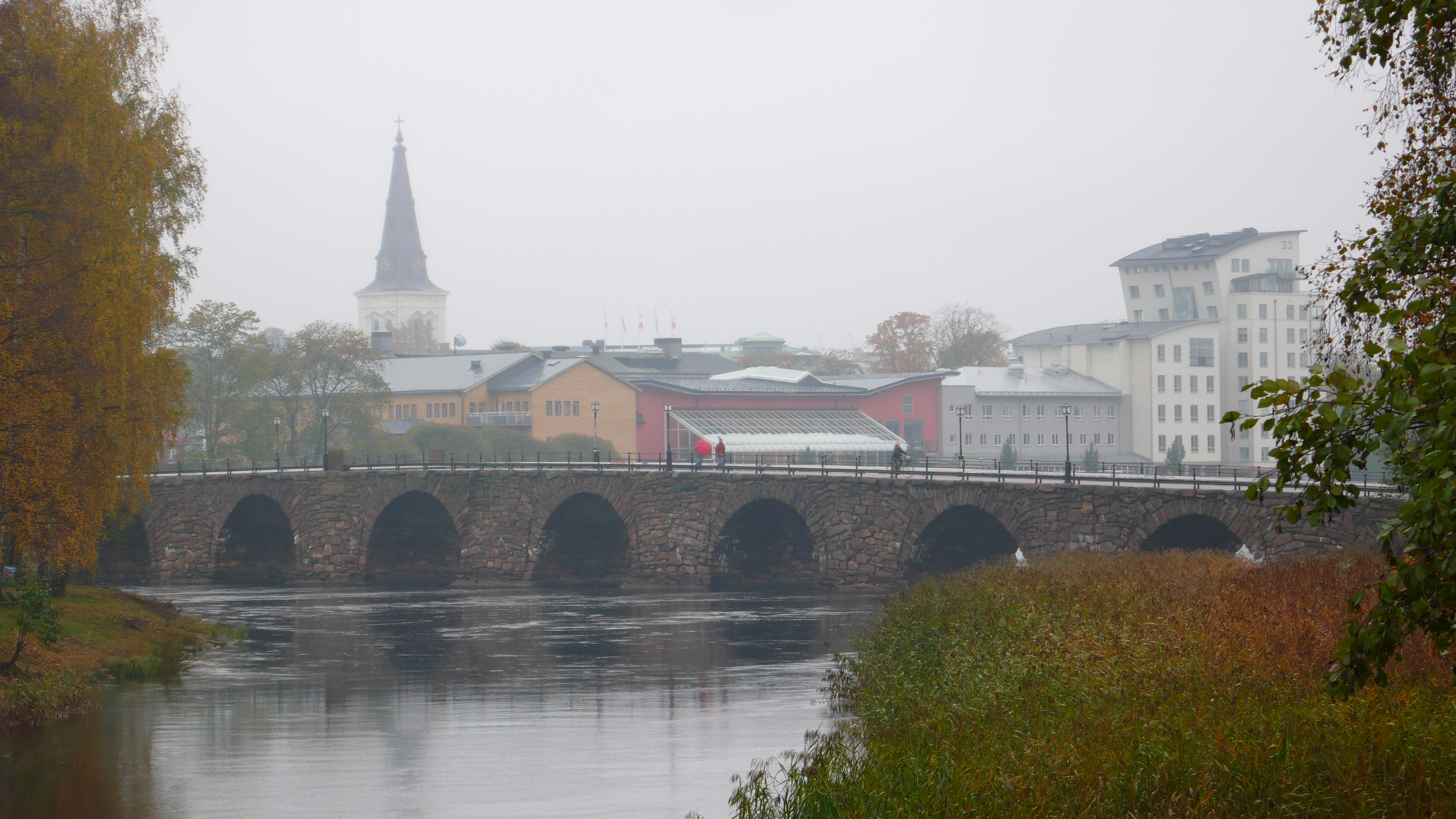 Stone bridge in Karlstad, Sweden.